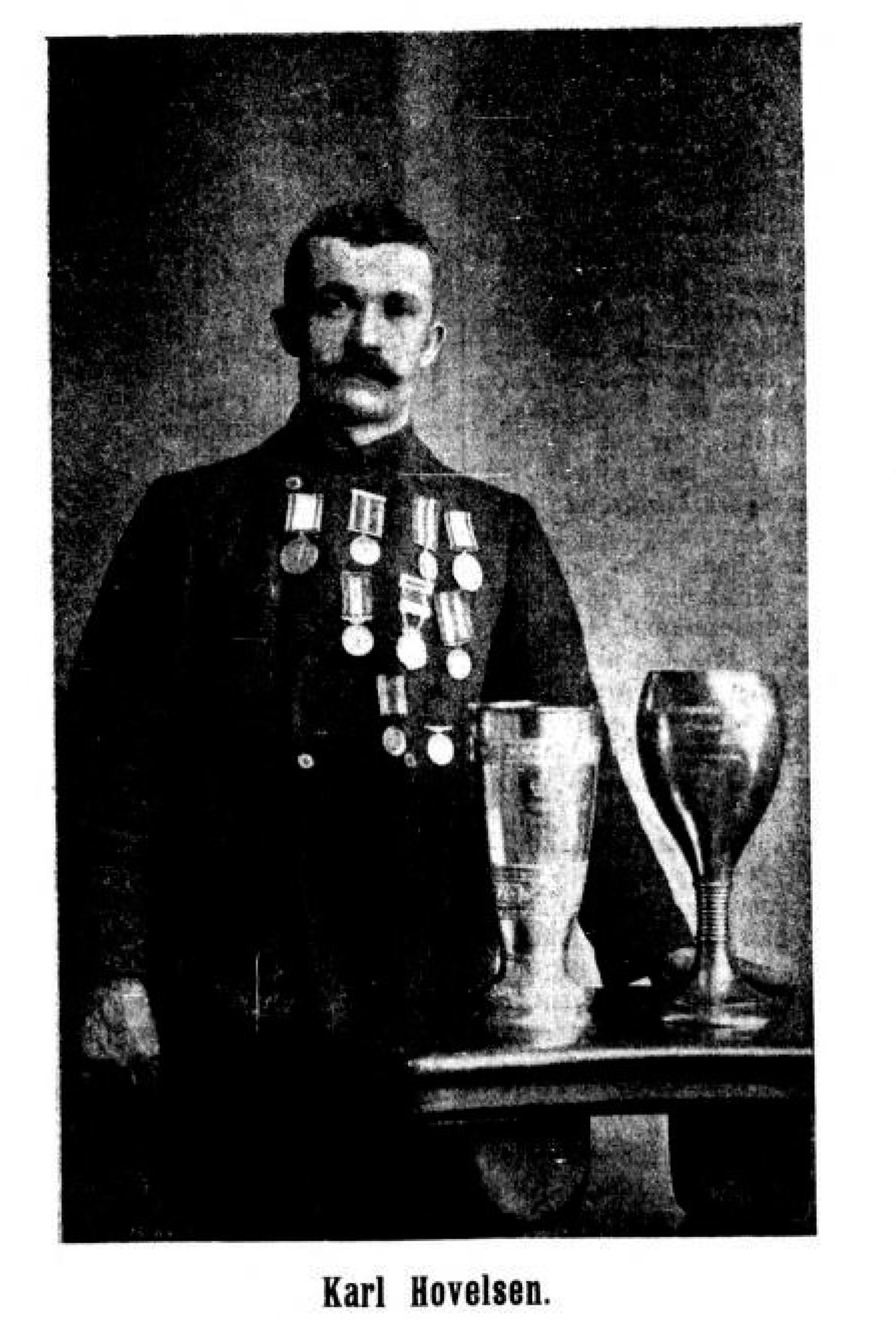 Photo publié dans Asker og Bærum Budstikke en 1903.